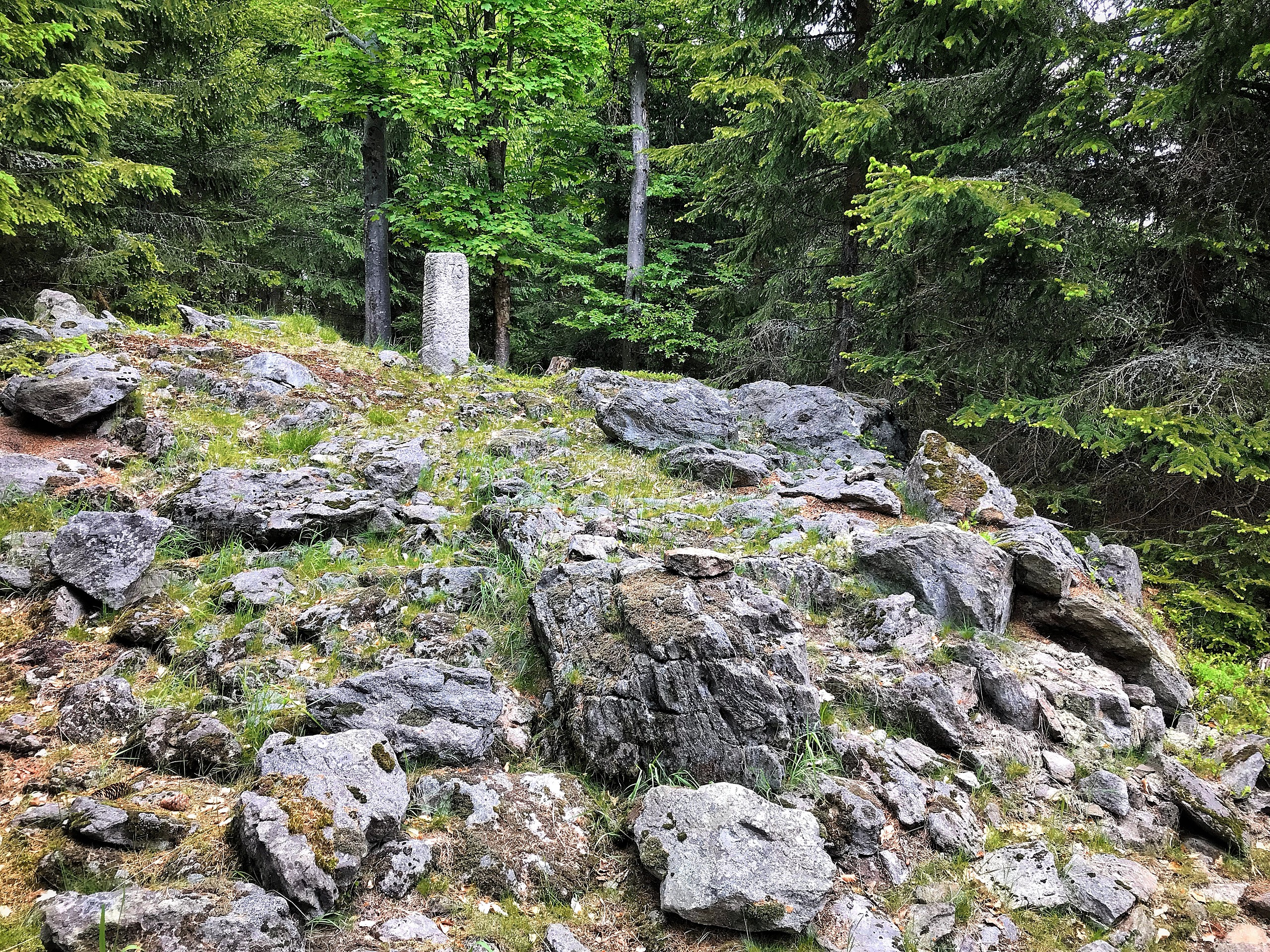 Vrchol Chlustova (1094) na Šumavě